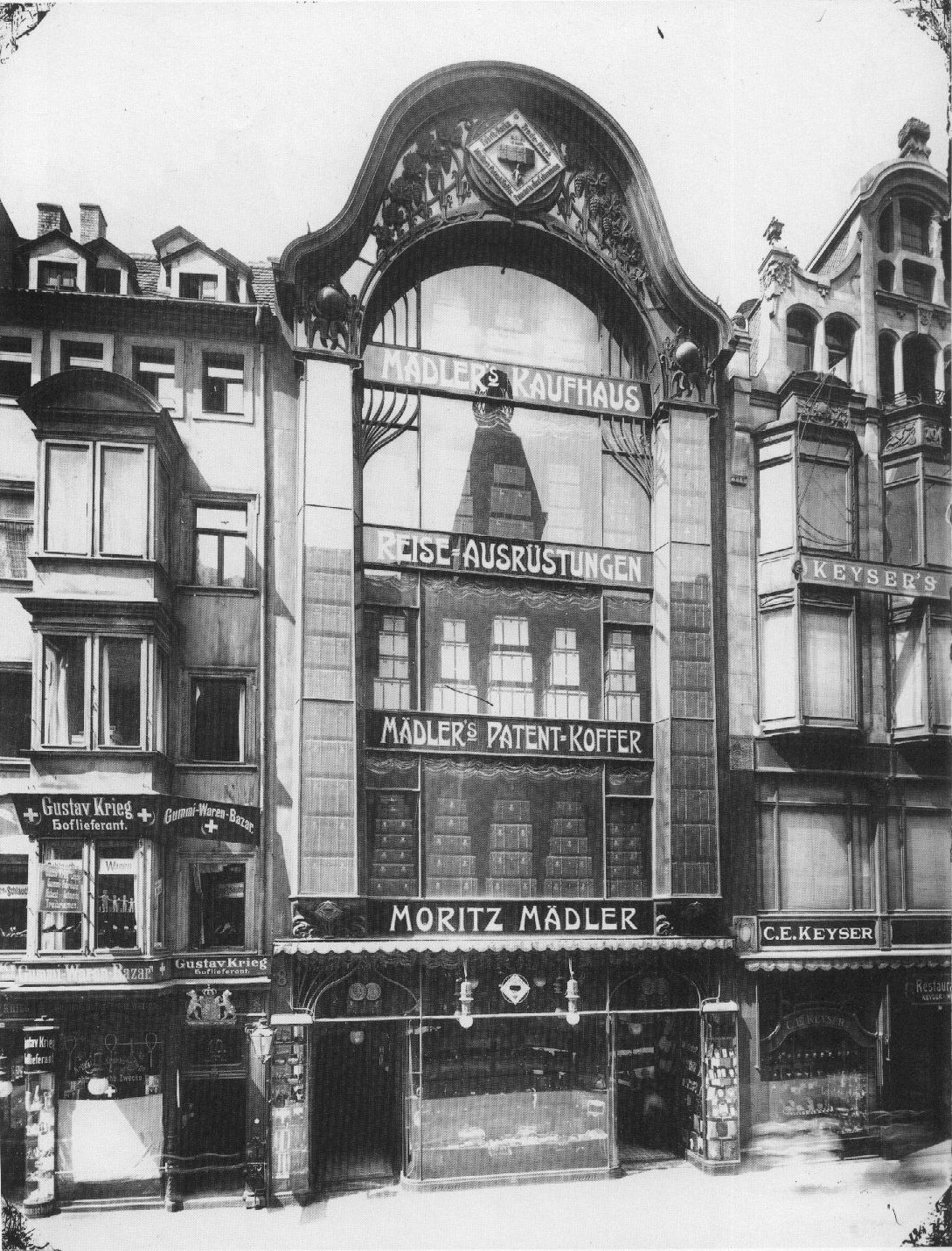 Das Geschäftshaus der Firma Moritz Mädler in der Petersstraße Nr. 8, nach 1900. Links davon Gustav Krieg, Hoflieferant, Gummi-Waren-Bazar, Rechts Restaurant C. E. Keyser